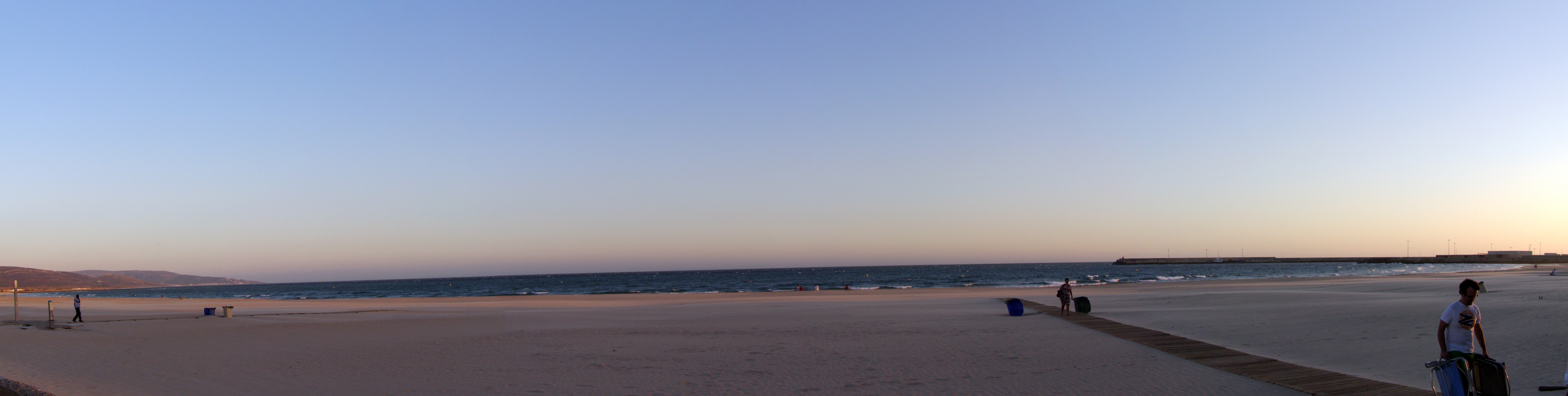 Playa de Barbate